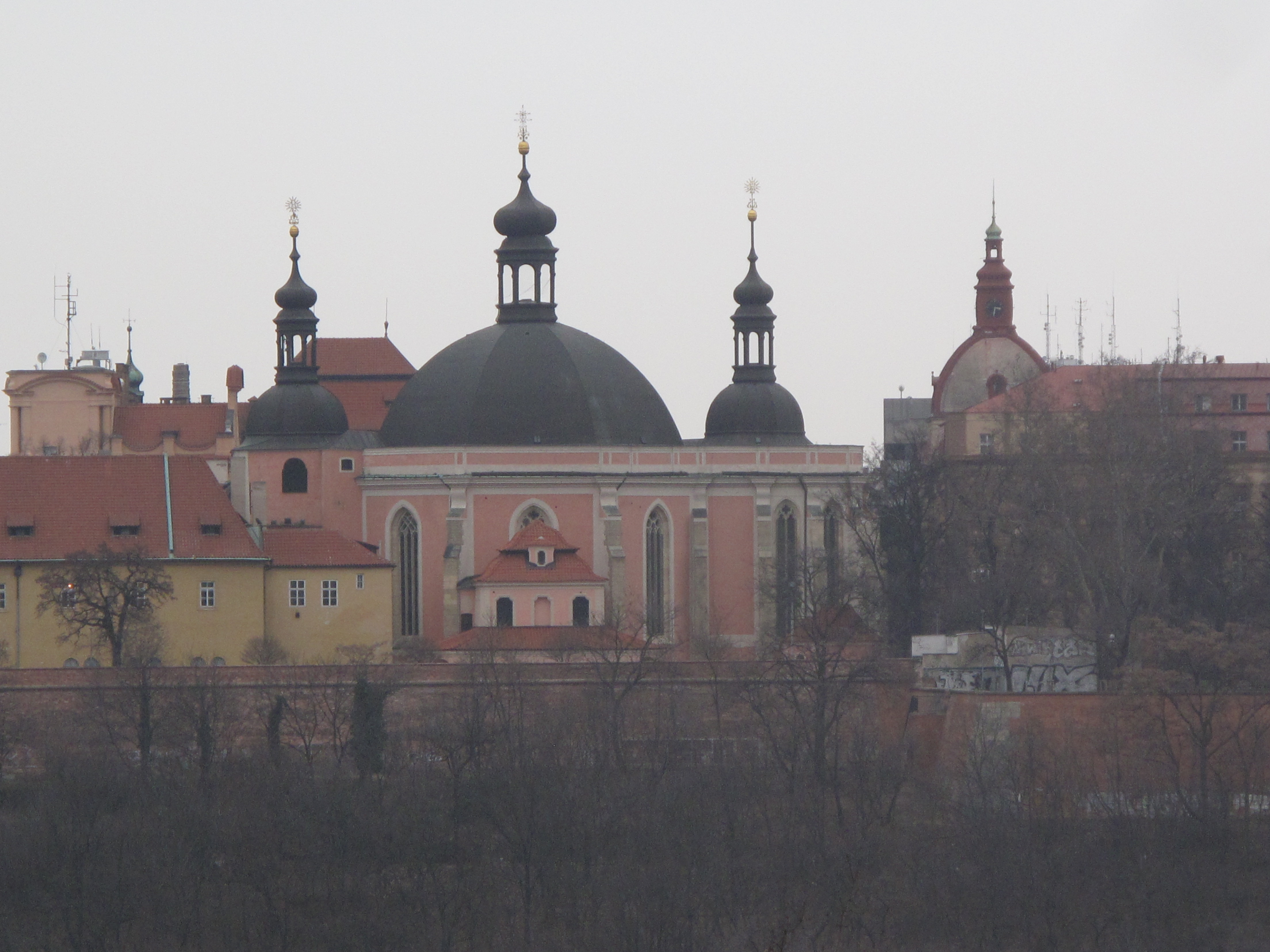 Výhled od stanice metra Vyšehrad